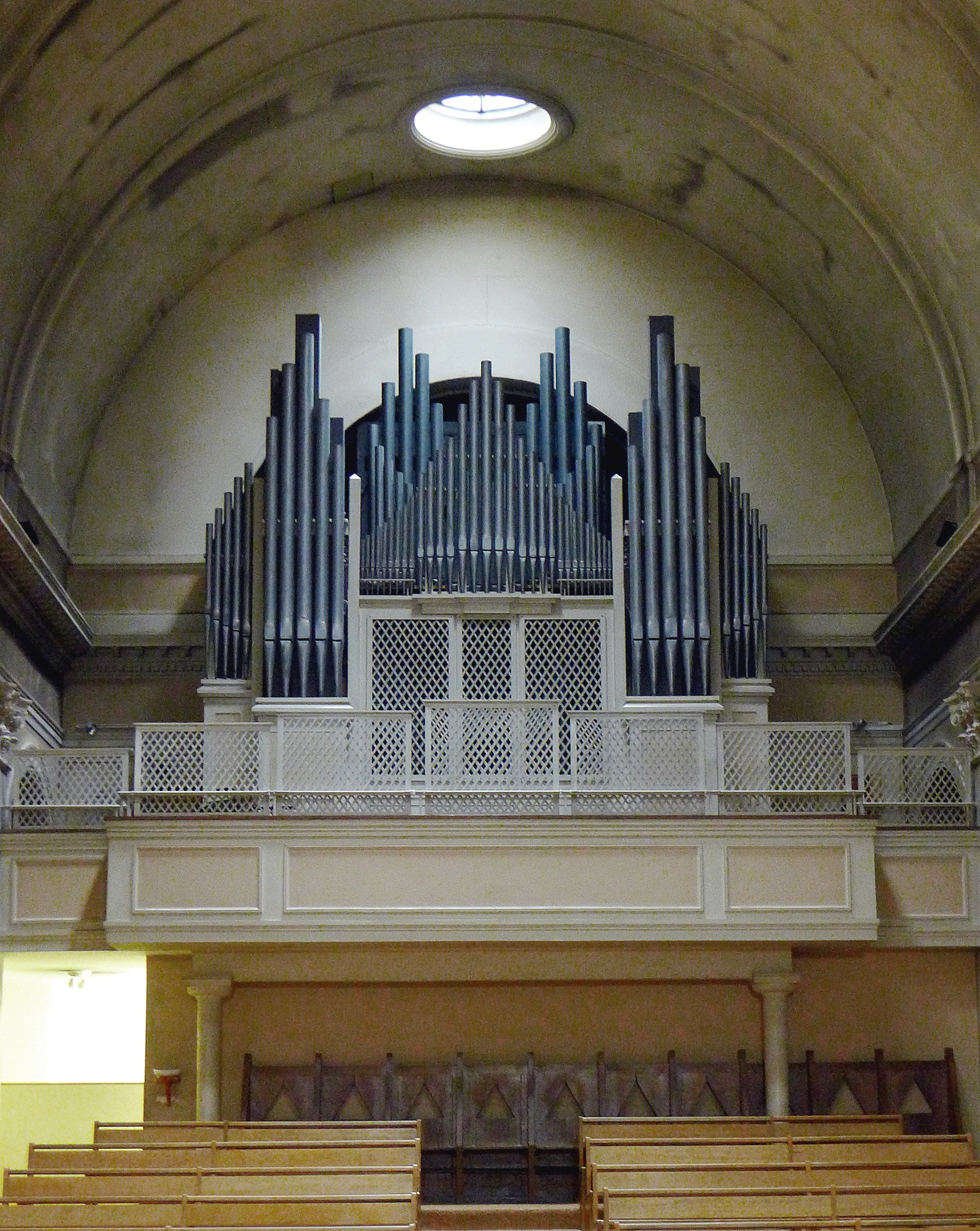 Église Notre-Dame-de-l'Assomption-de-Passy (orgue de tribune) - Paris XVI